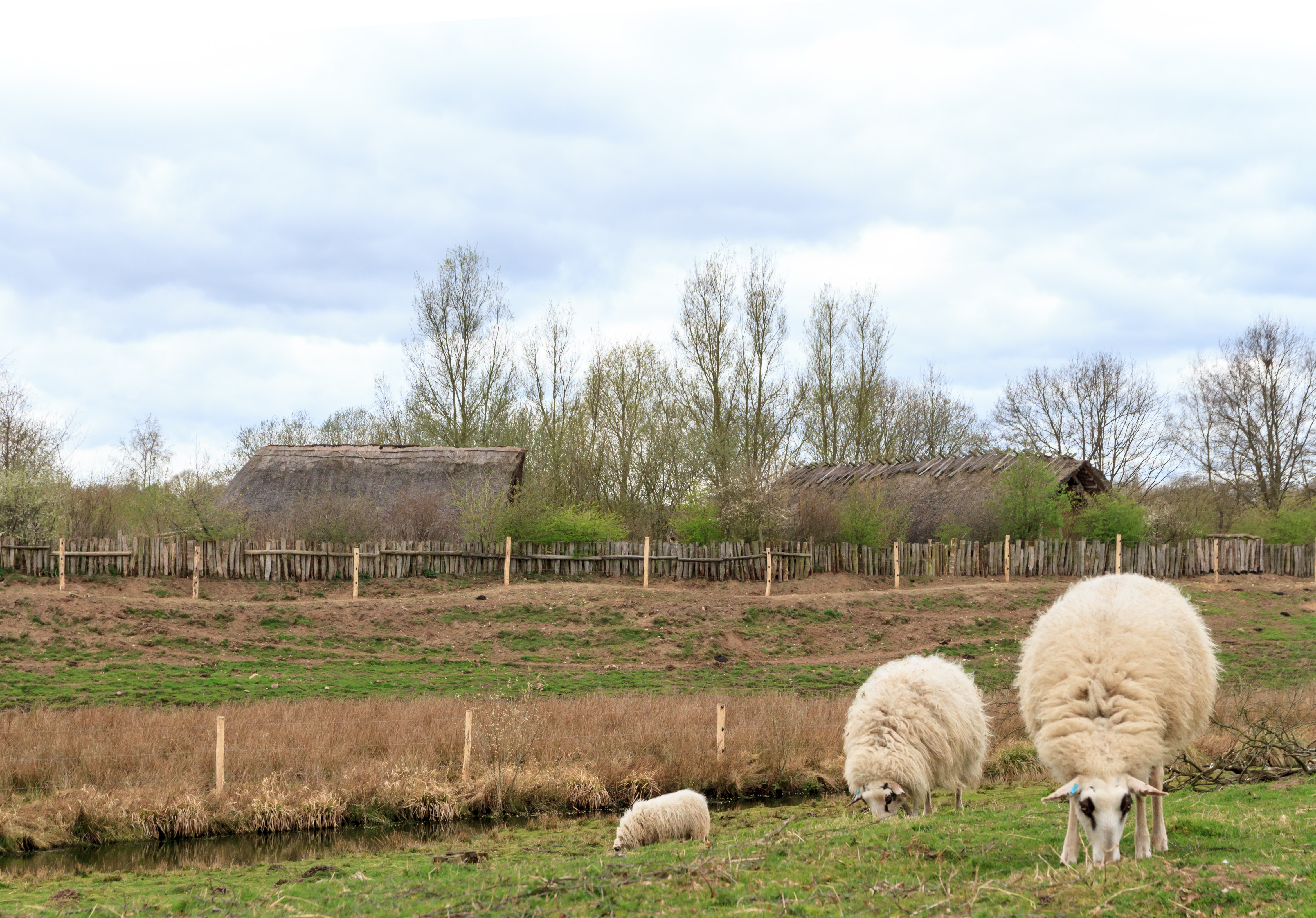 Tierpark Arche Warder